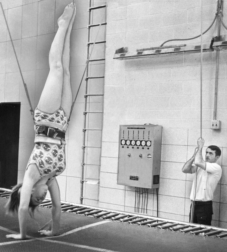 1976 PRESS PHOTO VICKI KIMBALL TRAINS SOMERSAULTS DICK